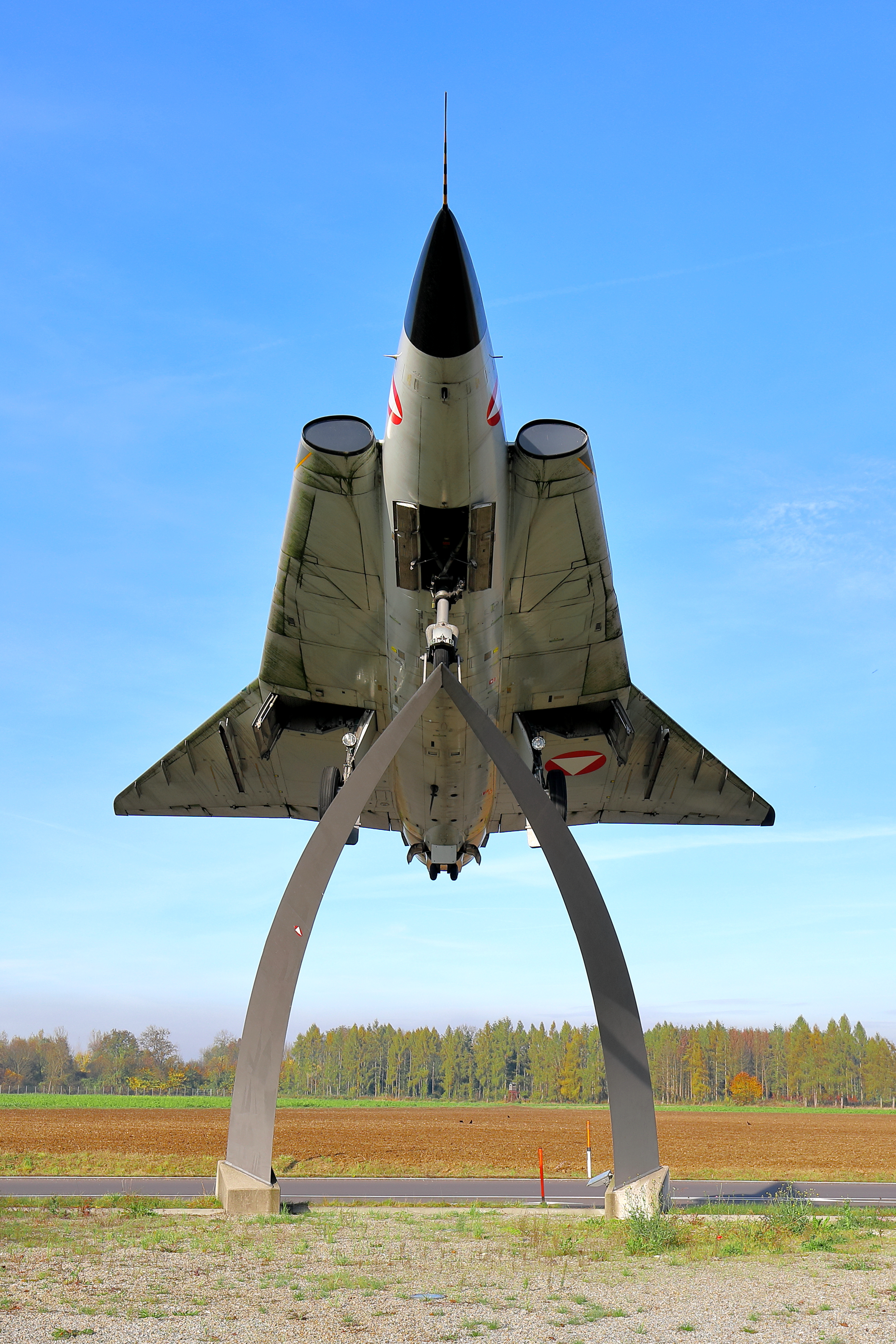 Das Schauobjekt Abfangjäger Saab-Draken an der Kreuzung Kasernenstraße/Salzburgerstraße (B1) in der oberösterreichischen Markgemeinde Hörsching.Das Schauobjekt ist eine Saab Draken J 35D (J 35OE) mit der Seriennummer 35-340 (Serialnummer 35-1411). Das Flugzeug wurde um 1965 gefertigt, am 14. Okt. 1988 dem Österreichischen Bundesheer überstellt und im April 2005 ausgemustert. Im Februar 2007 wurde es mittels Tieflader von Zeltweg nach Hörsching transportiert und im Zuge des Baues der Umfahrung Neubau 2009/2010 zwischen der Zufahrtsstraße zum Fliegerhorst Vogler und der B1 aufgestellt.